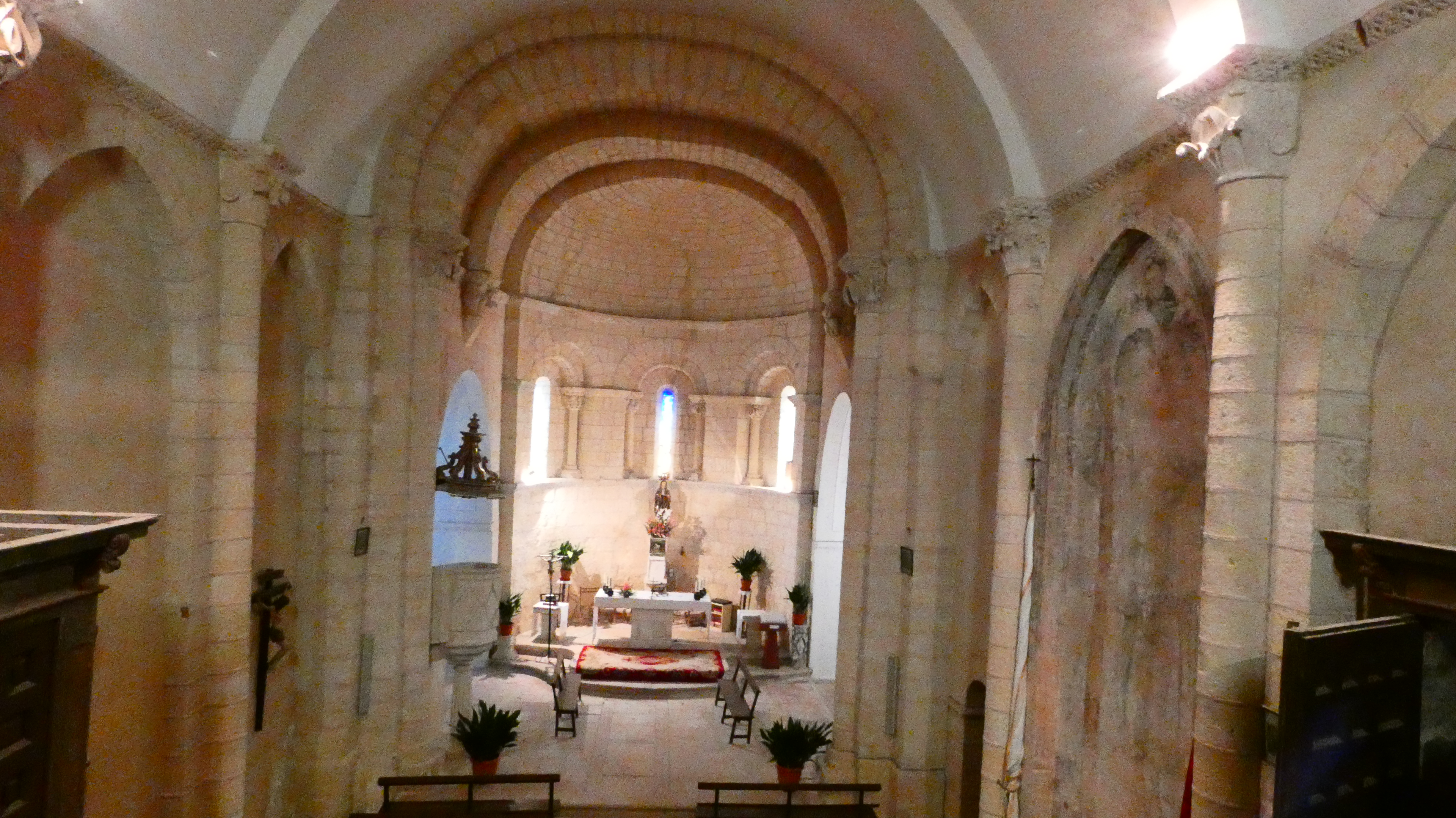 general interior